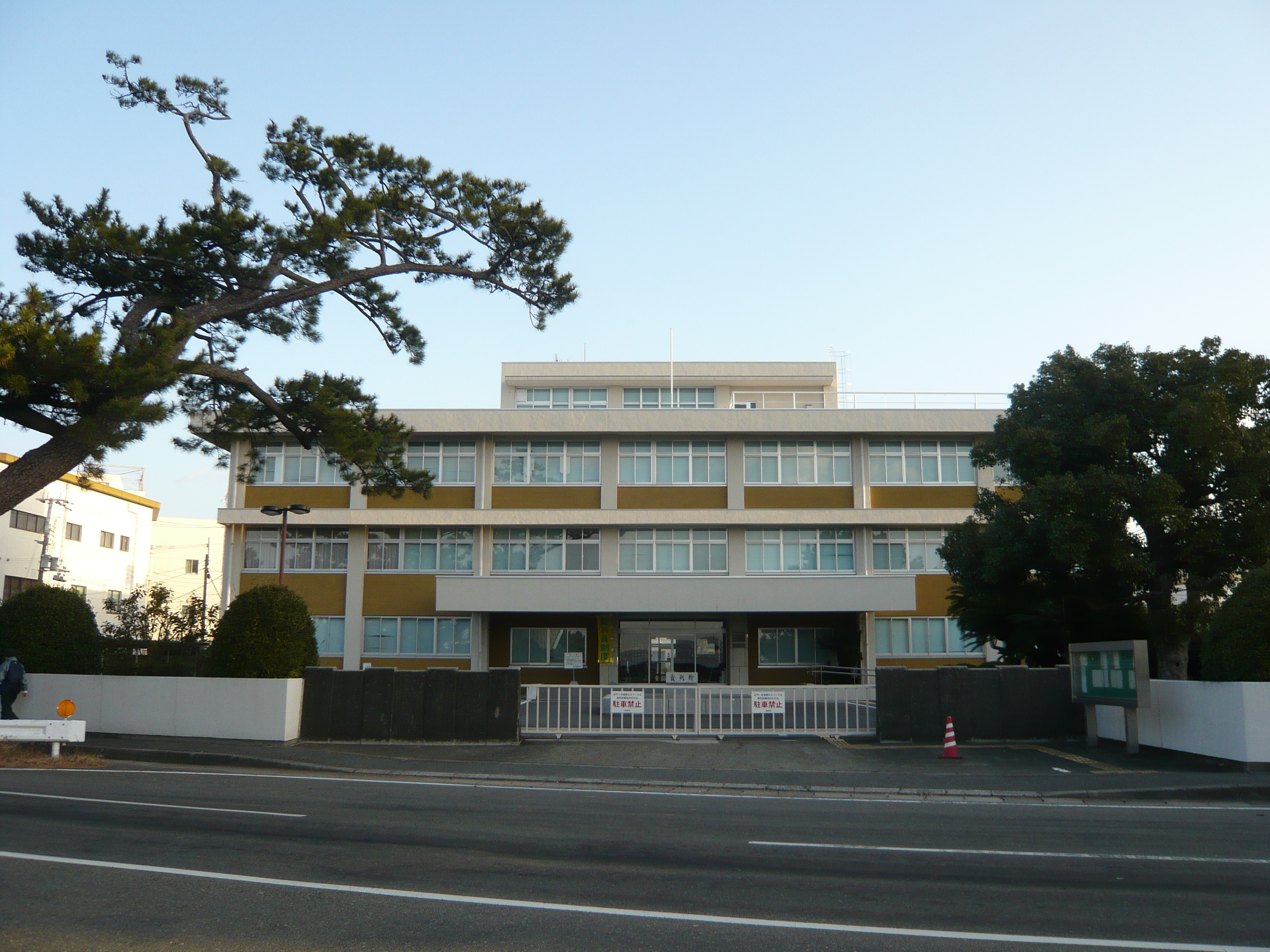 田辺簡易裁判所